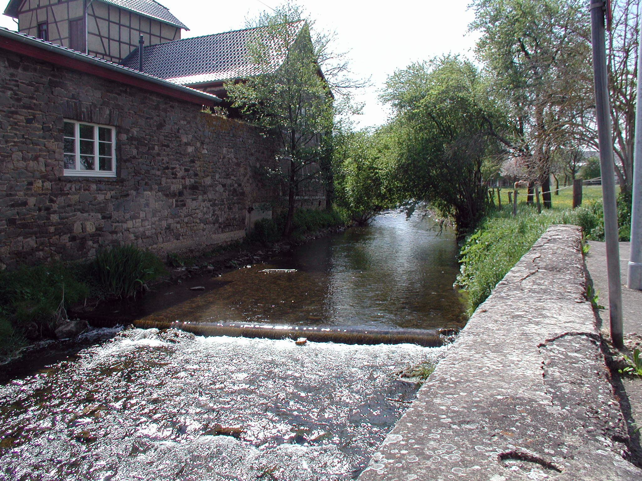 Bad Münstereifel Arloff. Erft und alte Mühle